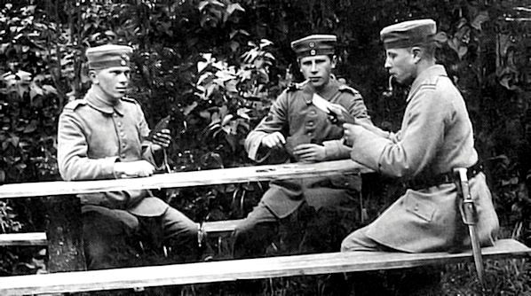 Jääkärit kortilla Lockstedtissa vuonna 1916. Vasemmalta jääkärit Jukius Salin, Ragnar Johannes Vaara ja Valdemar Sundqvist myöh. Salmelo.